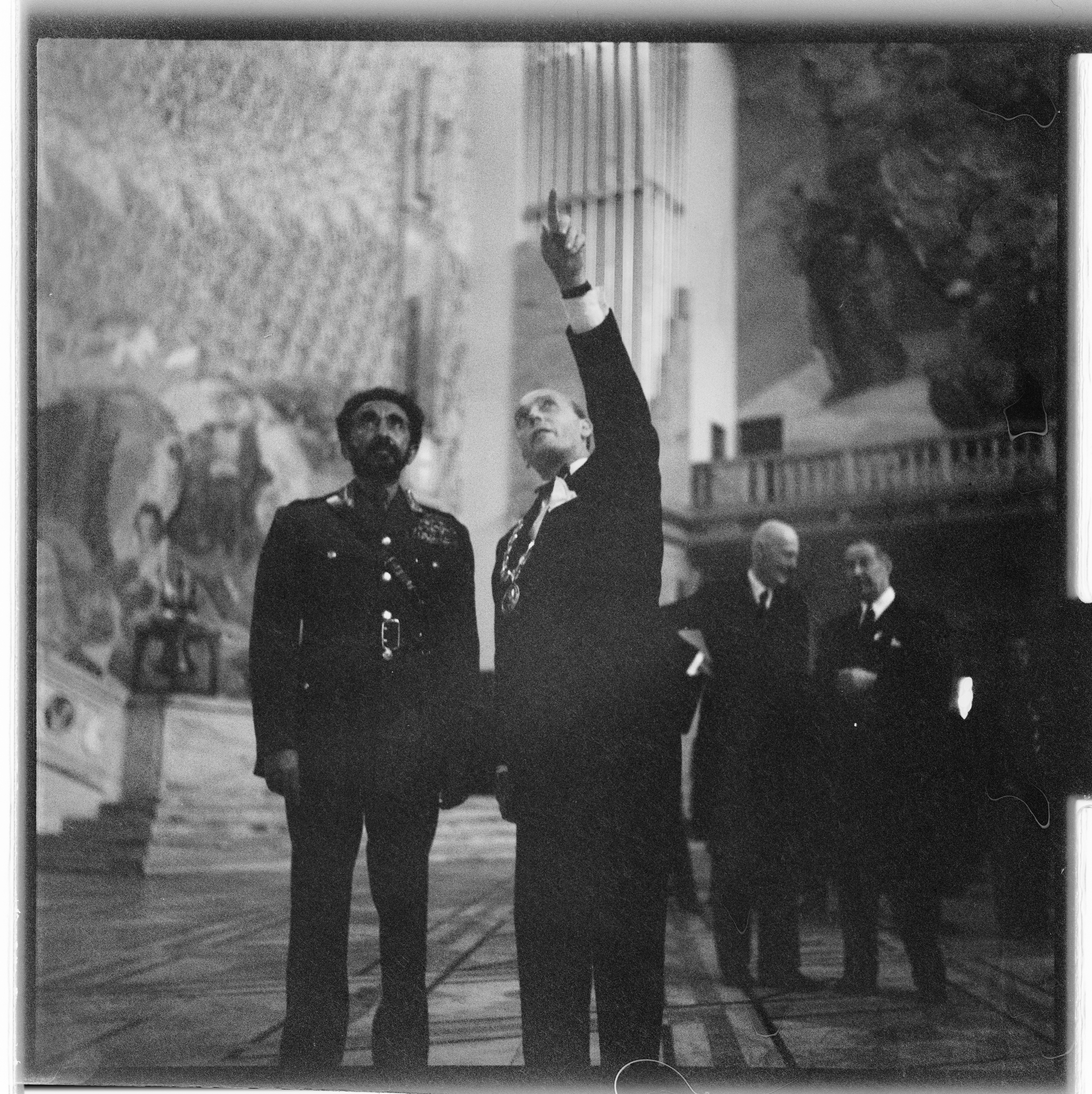 Bildet er hentet fra Arkivverket. Keiser Haile-Selassie. NÅ nr. 25, 1954 Arkivinstitusjon : Riksarkivet Arkivnavn : Billedbladet NÅ Sted : Norge, Oslo, Oslo, Oslo Rådhus Emneord: Arkitektur, Menn Avbildet: Keiser Haile-Selassie